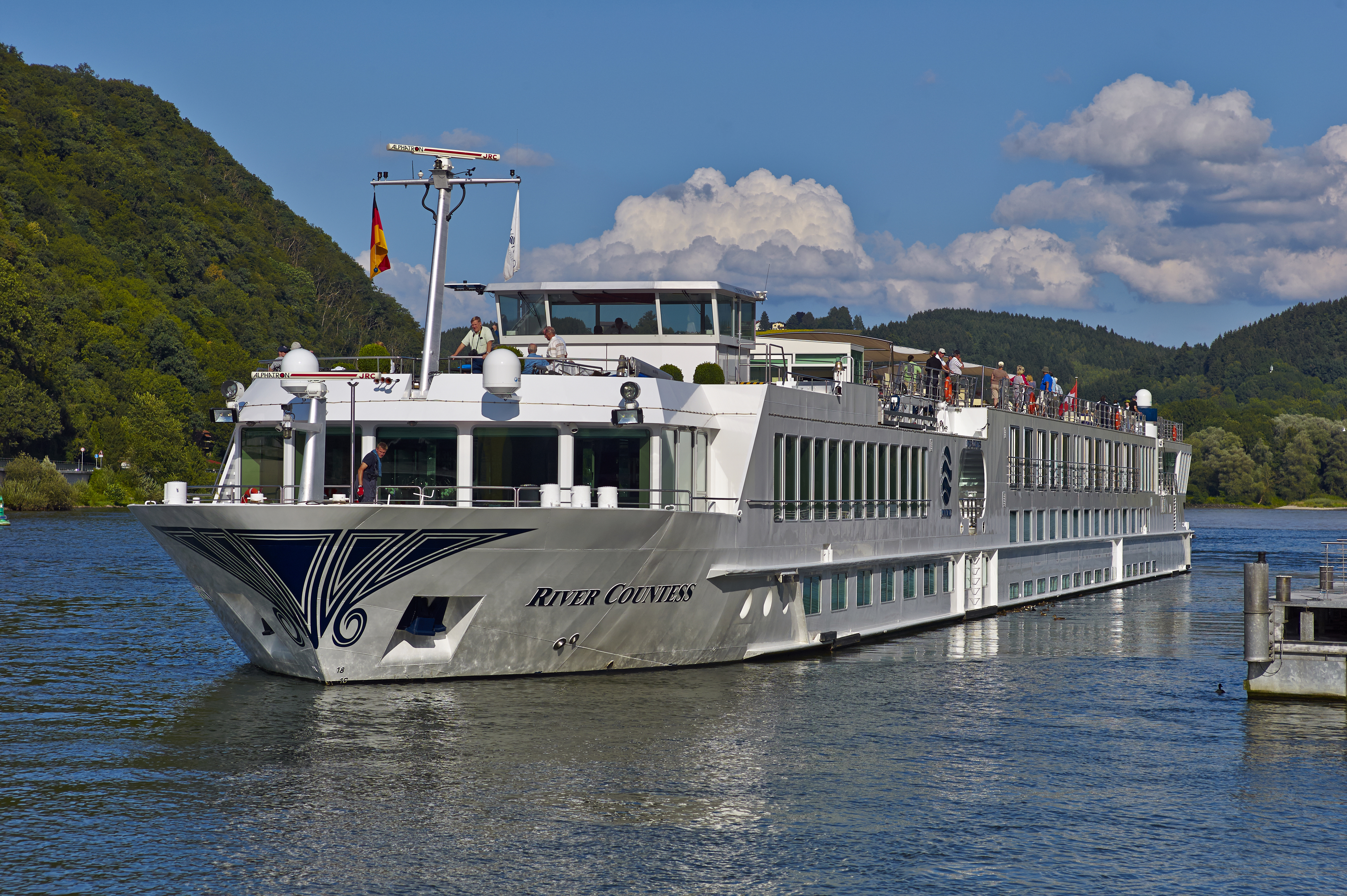 River Countess auf der Passauer Donau beim Ablegen